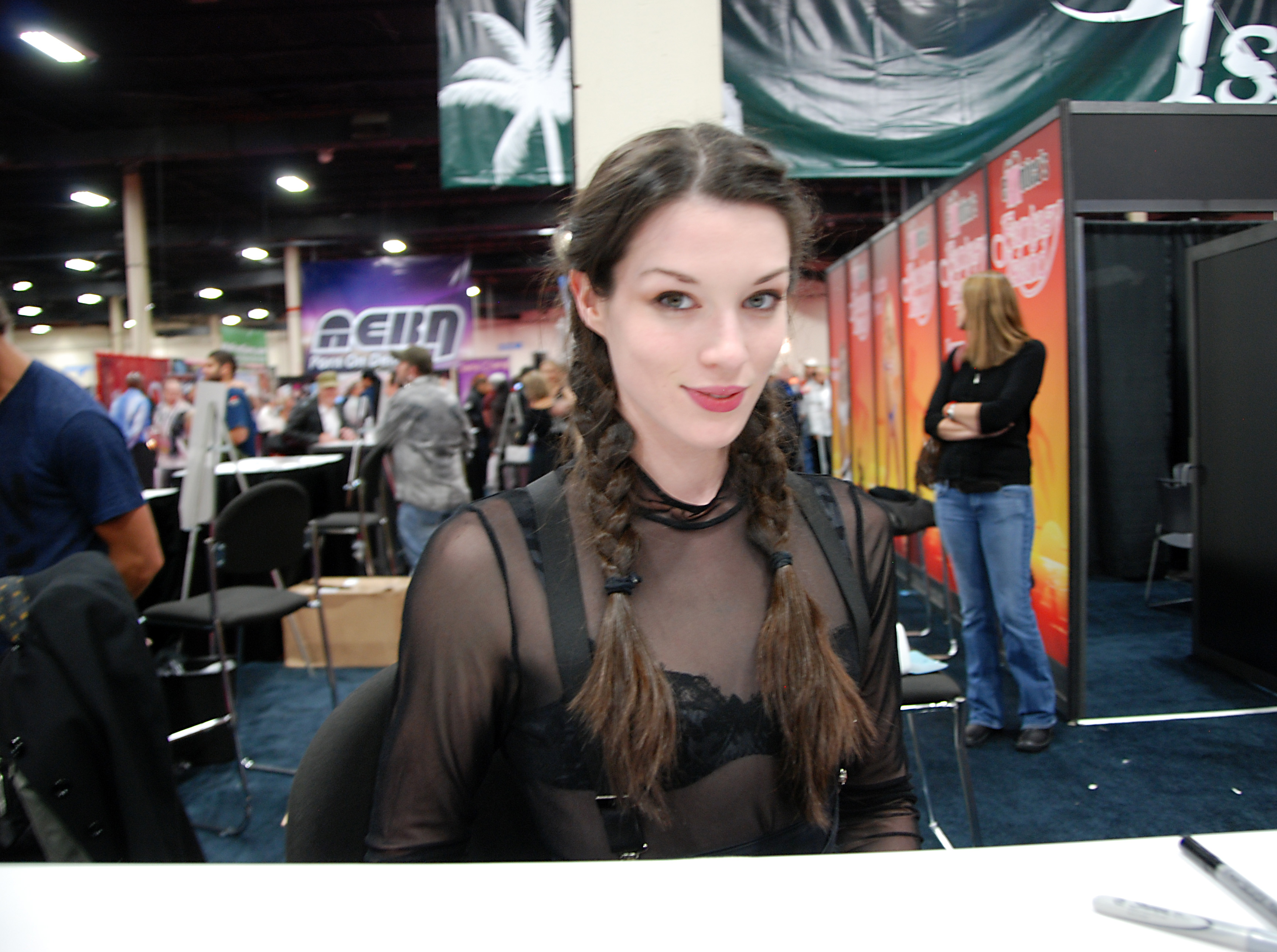 DSC_0715A